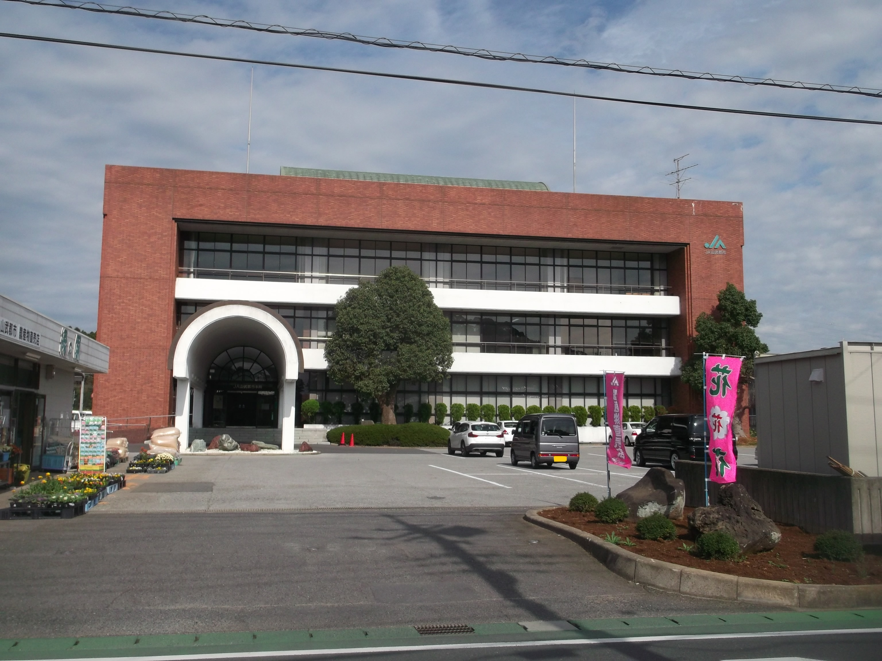 山武郡市農業協同組合